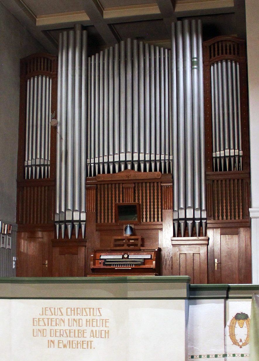 Prospekt der 1911 errichteten Strebel-Orgel (28 klingende Register) in der evang.-luth. Glasbläserkirche in Lauscha